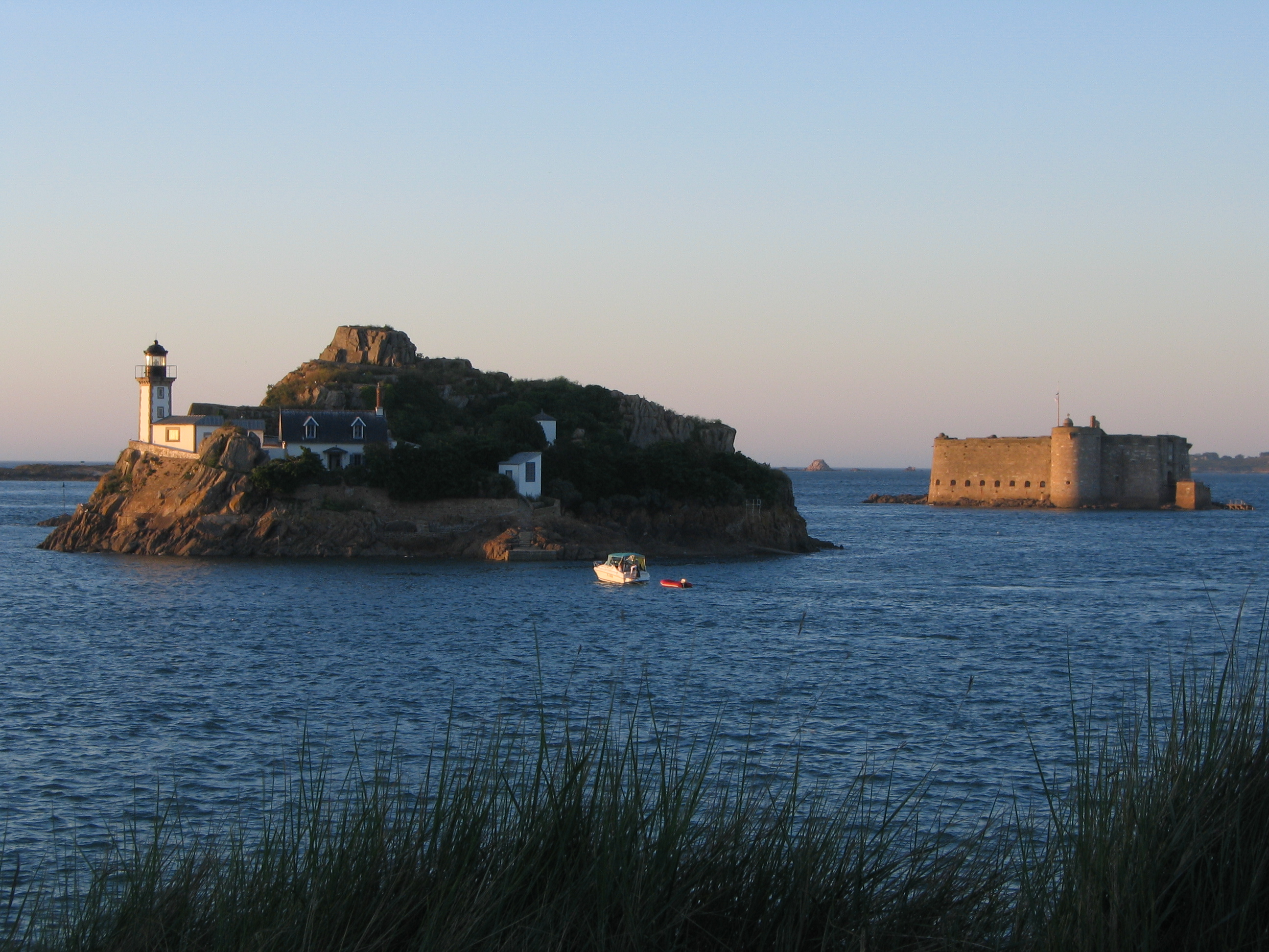 Couché de soleil sur l'île Louët et le château du Taureau en baie de Morlaix, à Carantec, vu de la pointe de Penn-al-Lann